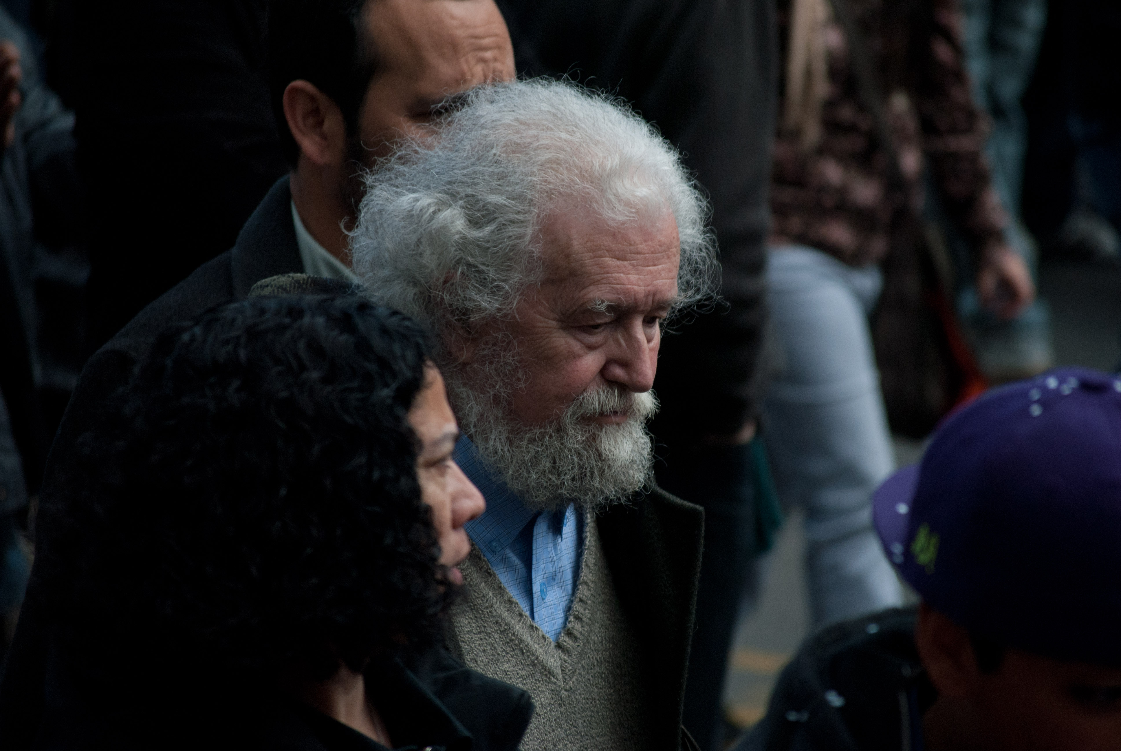 El sociólogo chileno Tomás Moulian durante una de las marchas estudiantiles de protesta.